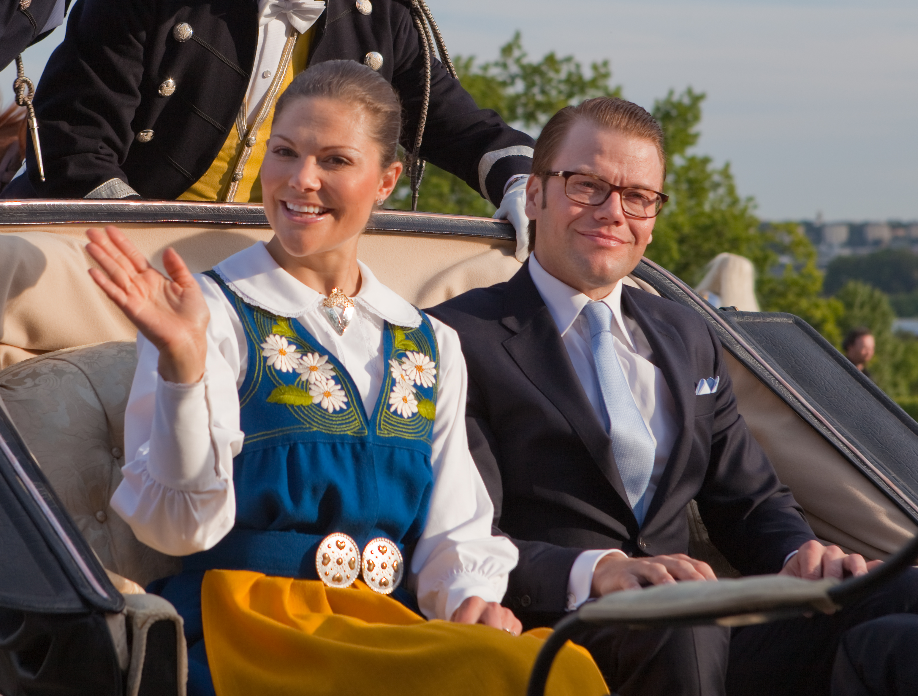 Sveriges Nationaldag 2010, Skansen, Stockholm. Kronprinsessan Victoria och soon to be make Daniel Westling